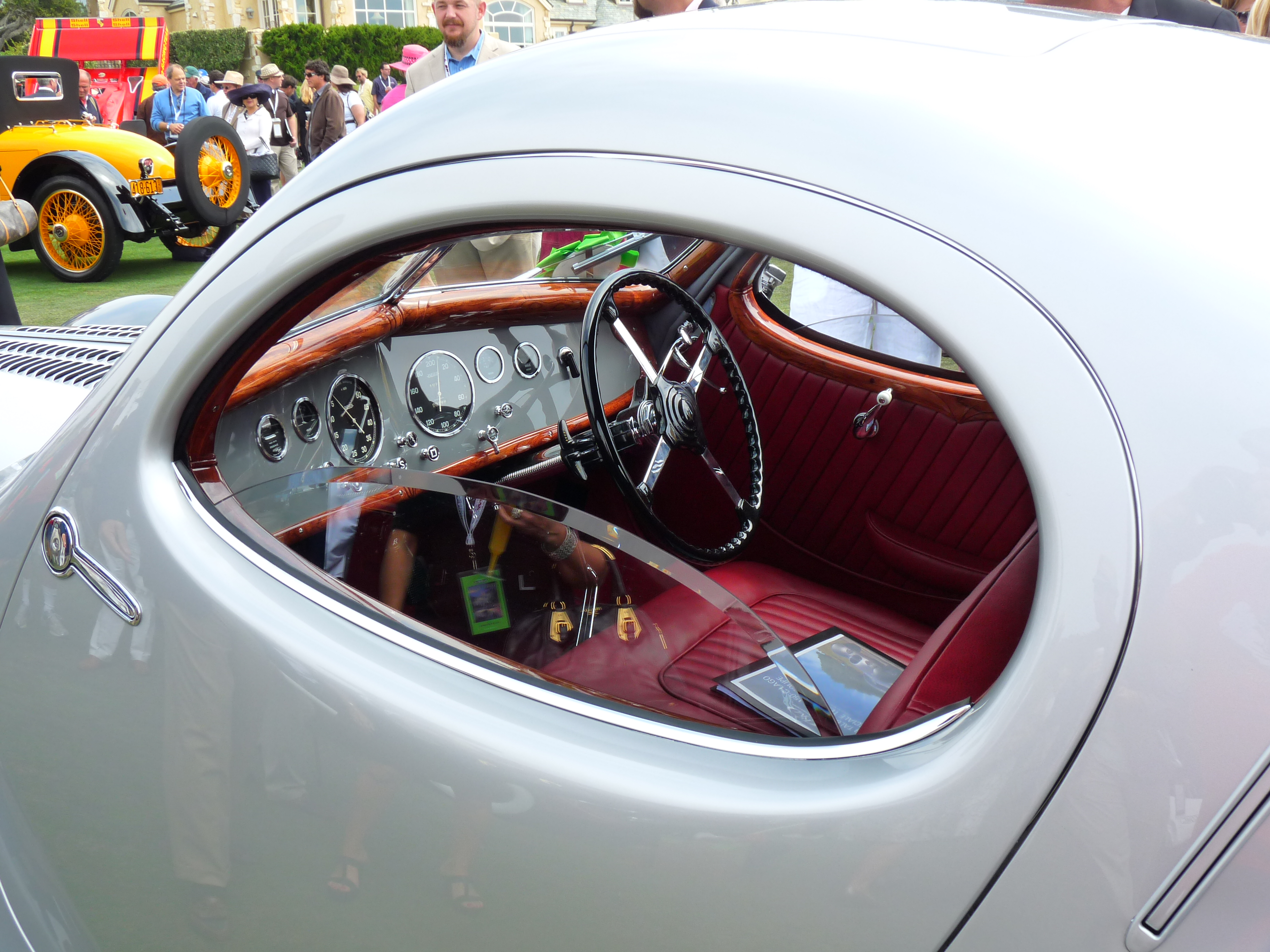 1938 Talbot-Lago T150C SS Figoni et Falaschi Coupe